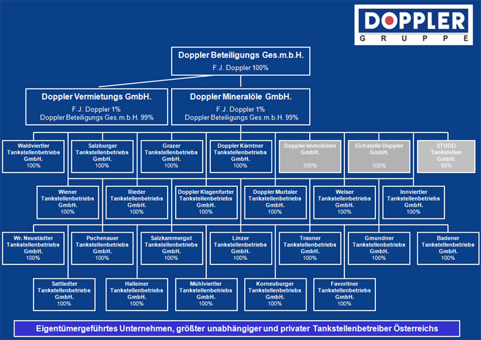 Organigramm der DOPPLER Gruppe